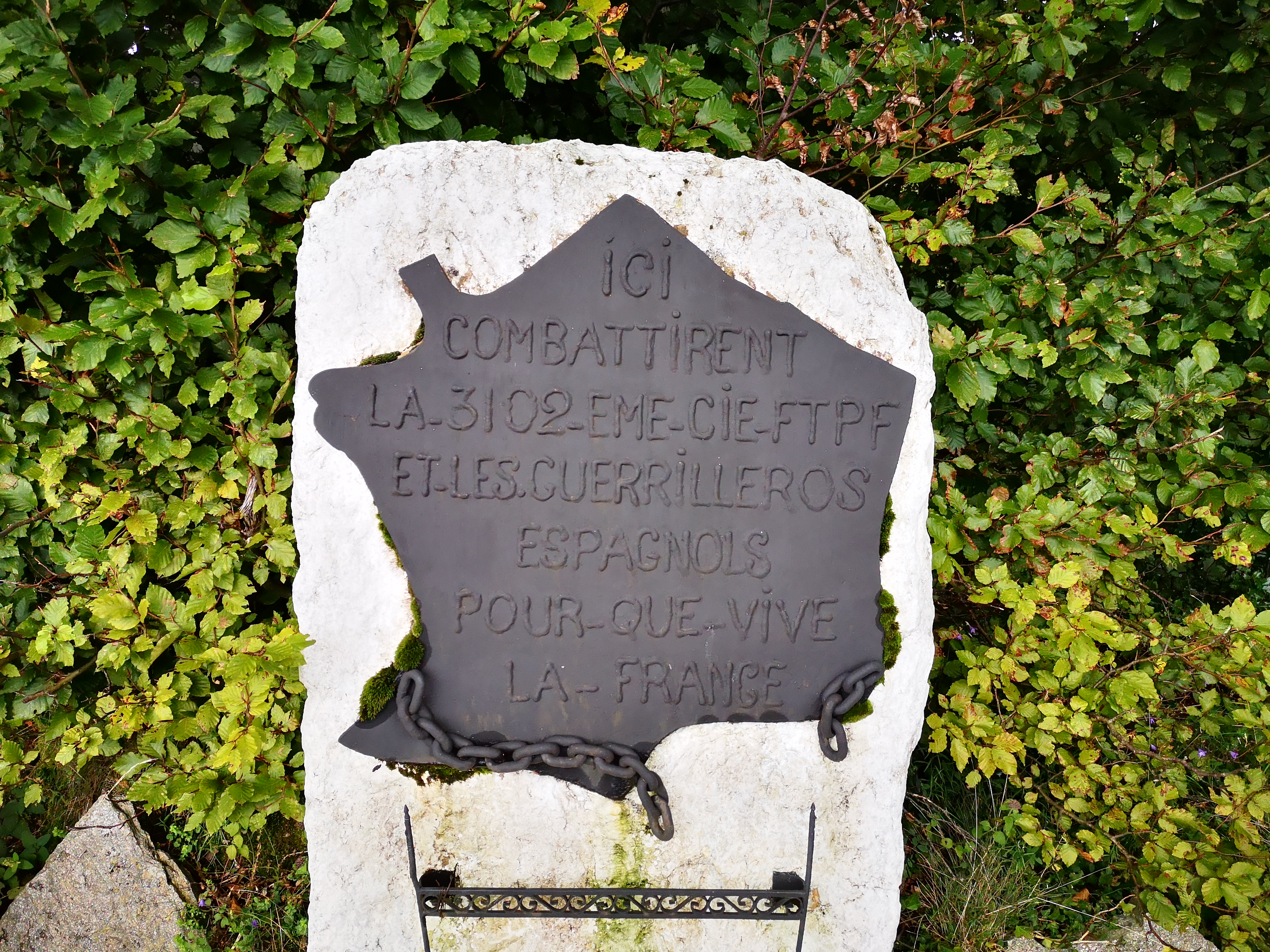 A l'intersection de la D33 et de la D18b, au dessus du col de Rille et en contrebas du col de la Crouzette, à l'extrémité sud de la commune de Rimont sur la route des crêtes